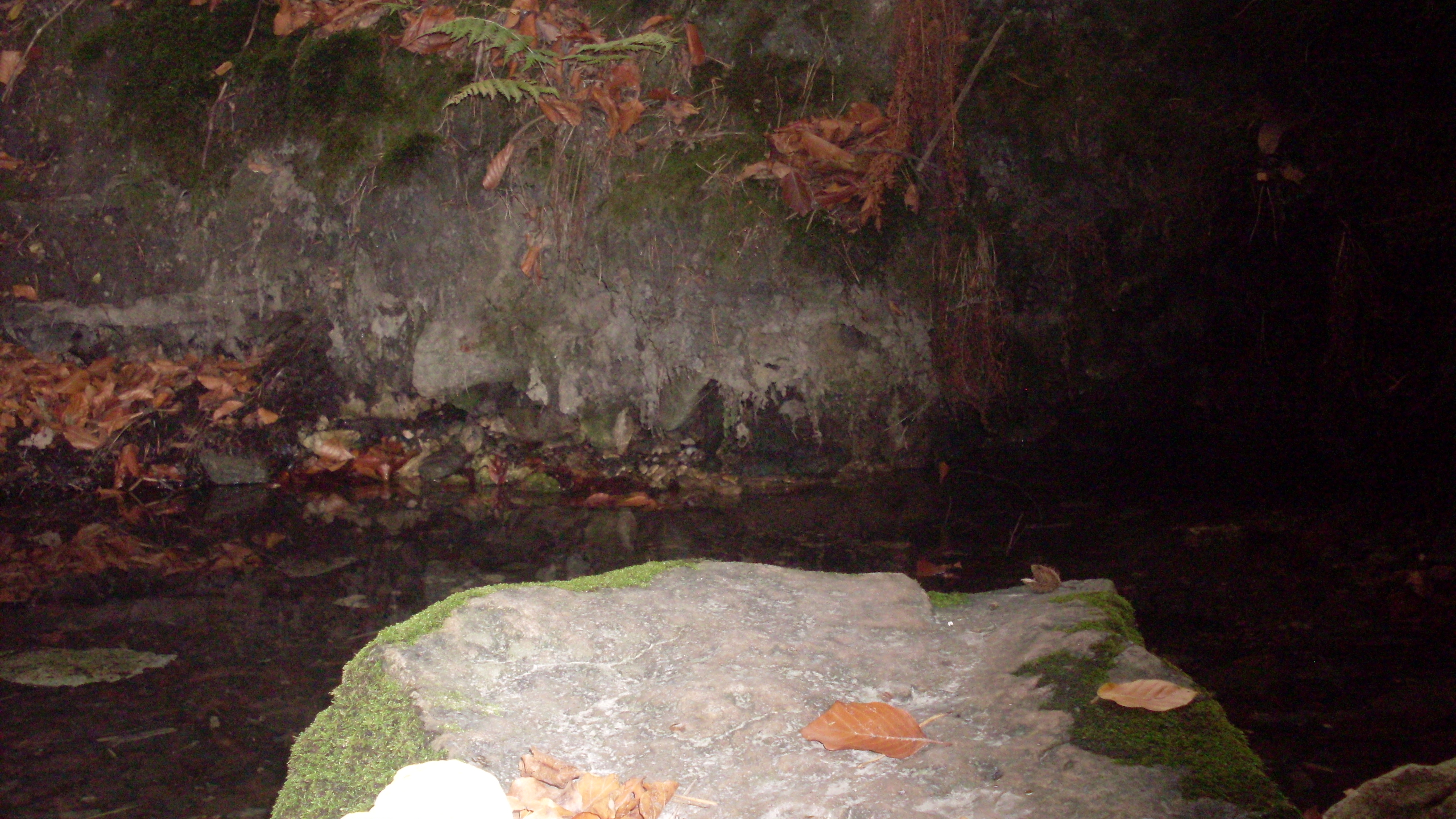 Źródło Dzwonek .Krzeszowice. Żbik